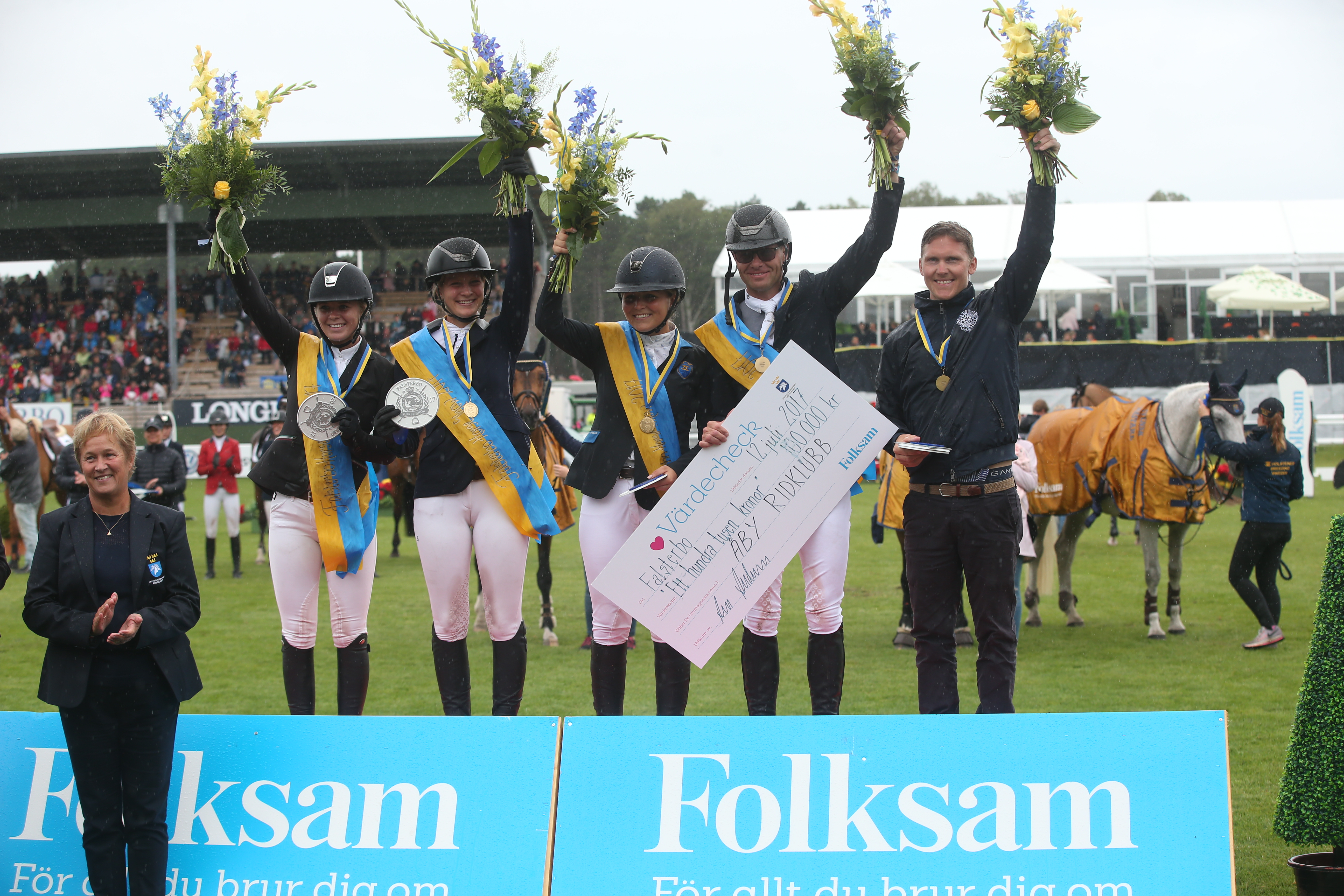 Åby Ridklubb vann Folksam Elitallsvenska, lag-SM i hoppning. Fr v Ann-Catrine Bengtsson, Andrea Falk, Gabriella Mannerson, Sissela Smith, Marcus Westergren och Jonas Rinné